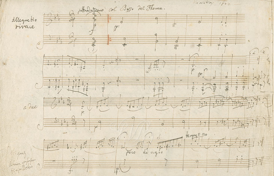 Manuscrit des Variations héroïques op. 35 de Ludwig van Beethoven.